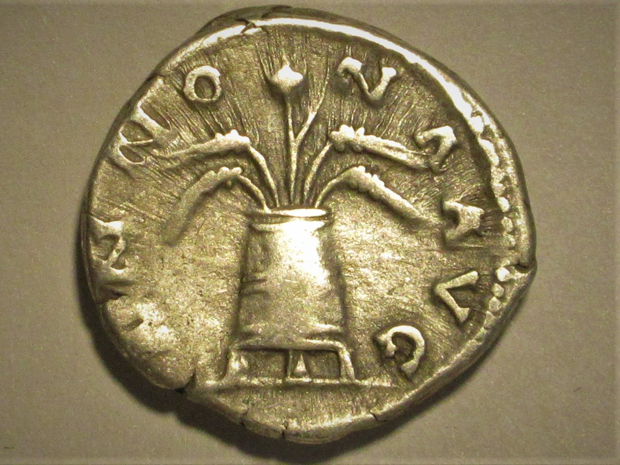 Modius mit Getreideähren und Mohnkapsel gefüllt, ANNONA AVG, Denar des Hadrian, Kampmann 32.47